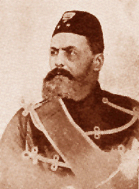 Беларуская (тарашкевіца): Фотапартрэт караля Сэданга Марыя I